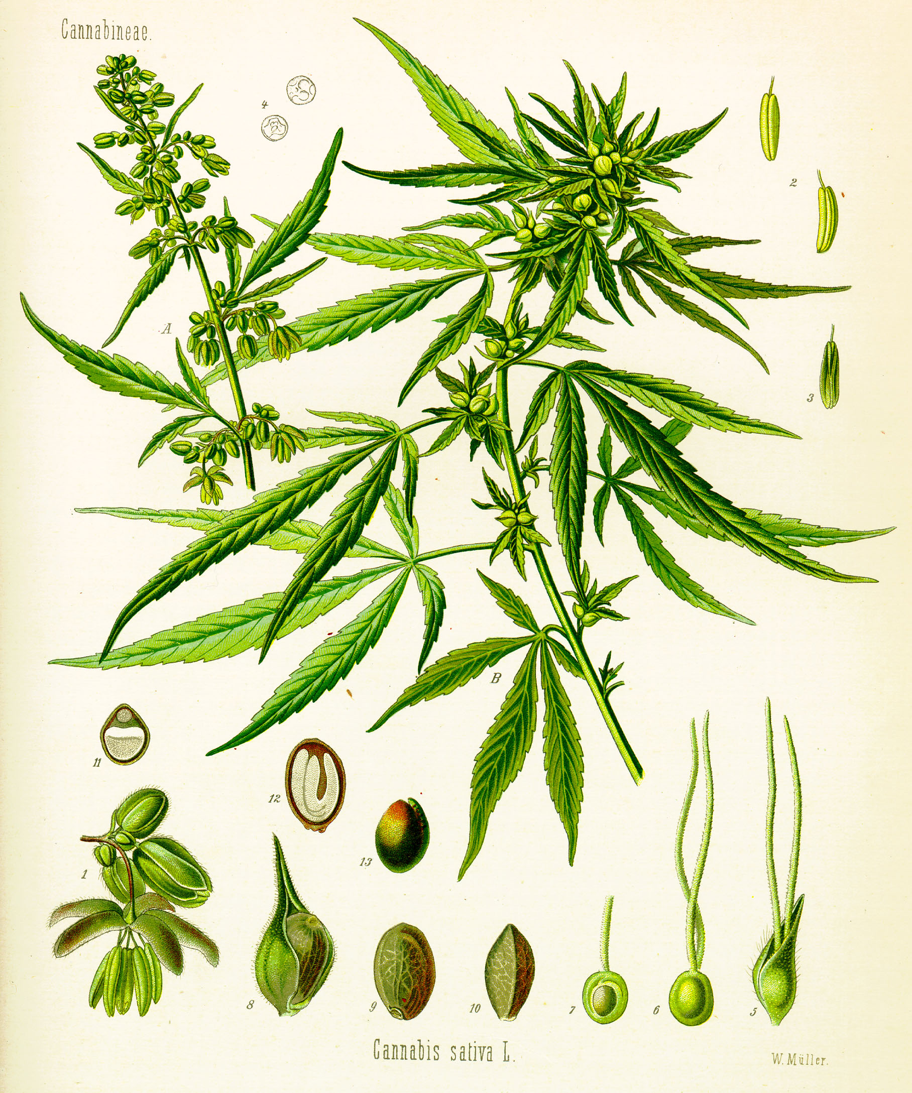 Planche botanique n° I-13 de l'"Atlas des Plantes médicinales de Köhler en images réalistes avec brèves notes explicatives" consacrée au chanvre.